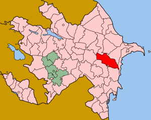 Map of Azerbaijan showing Hajigabul (Hacıqabul) rayon.